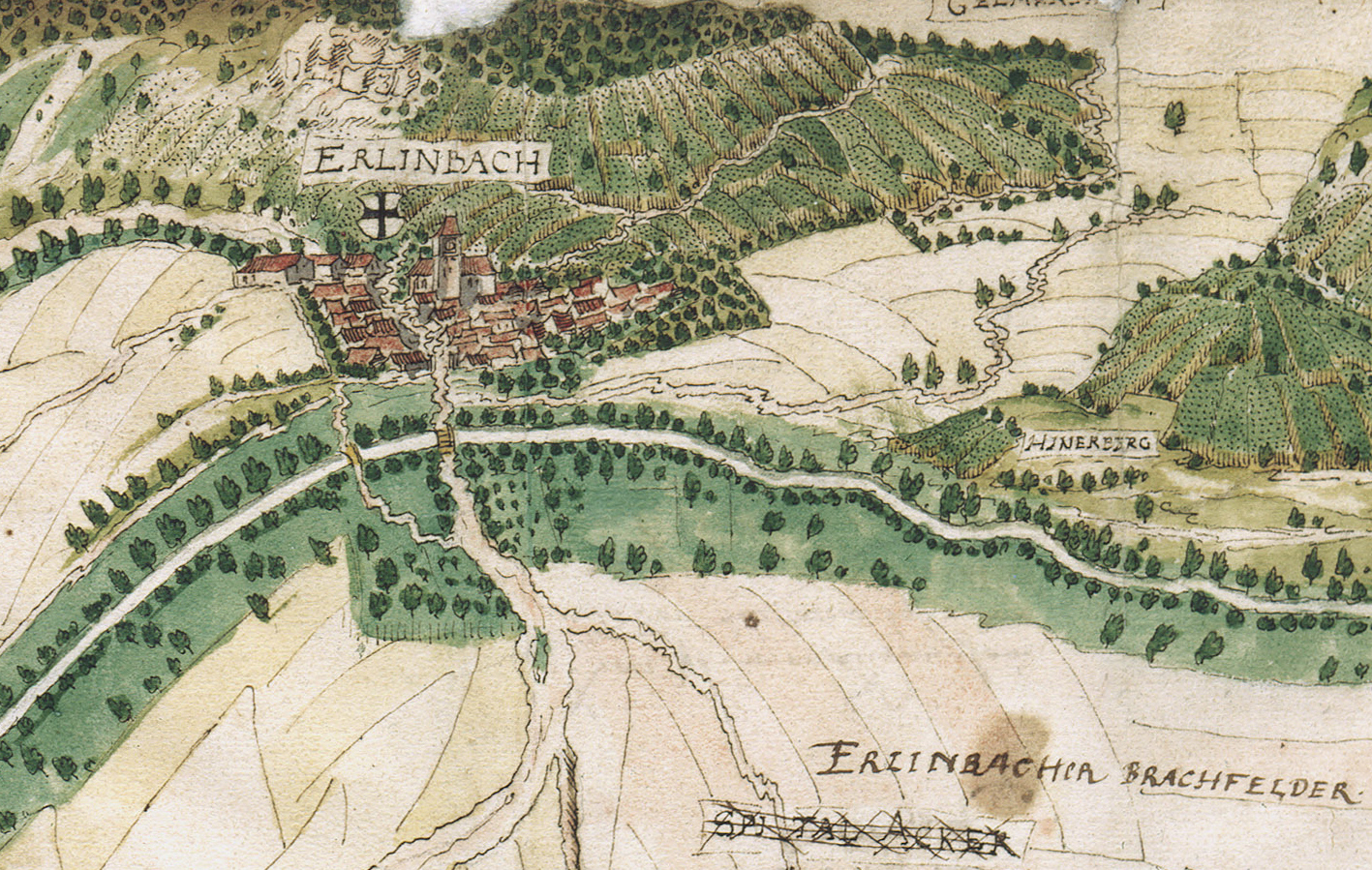 Territorium der Reichsstadt Heilbronn von Hans Peter Eberlin, 1578 (HStAS C 3 Bü 4290), Detail: Erlenbach